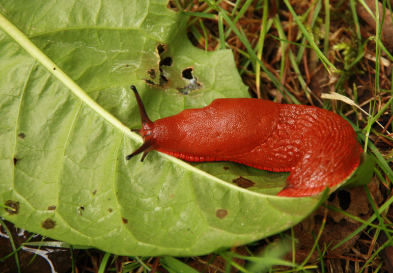 Limace Arion Rufus dans un sous-bois de Bâgé-la-ville, Ain, France